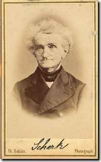 Foto di Heinrich Scherk